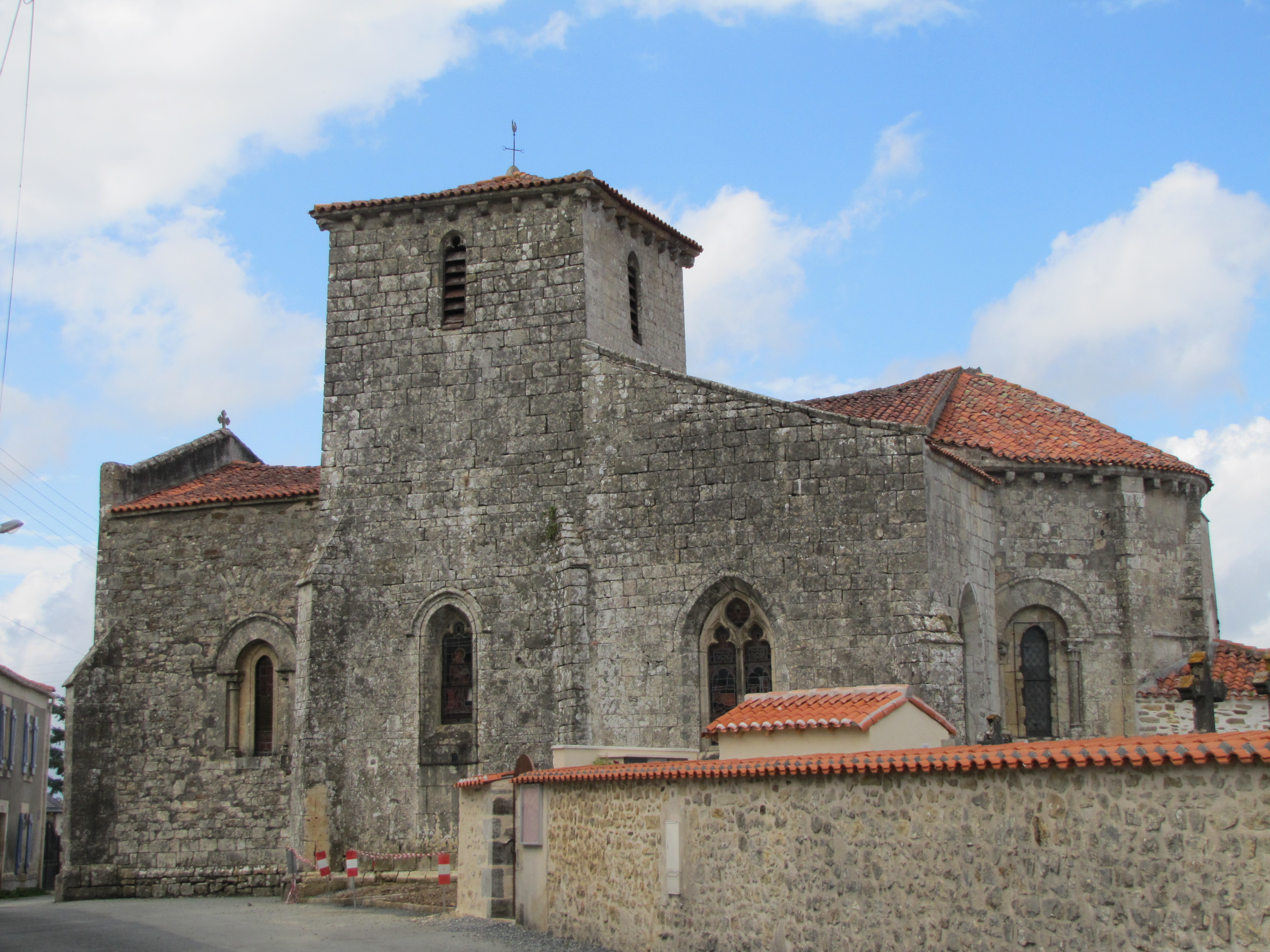 Église Saint-Loup de Puy-de-Serre, (Inscrit, 1932) .